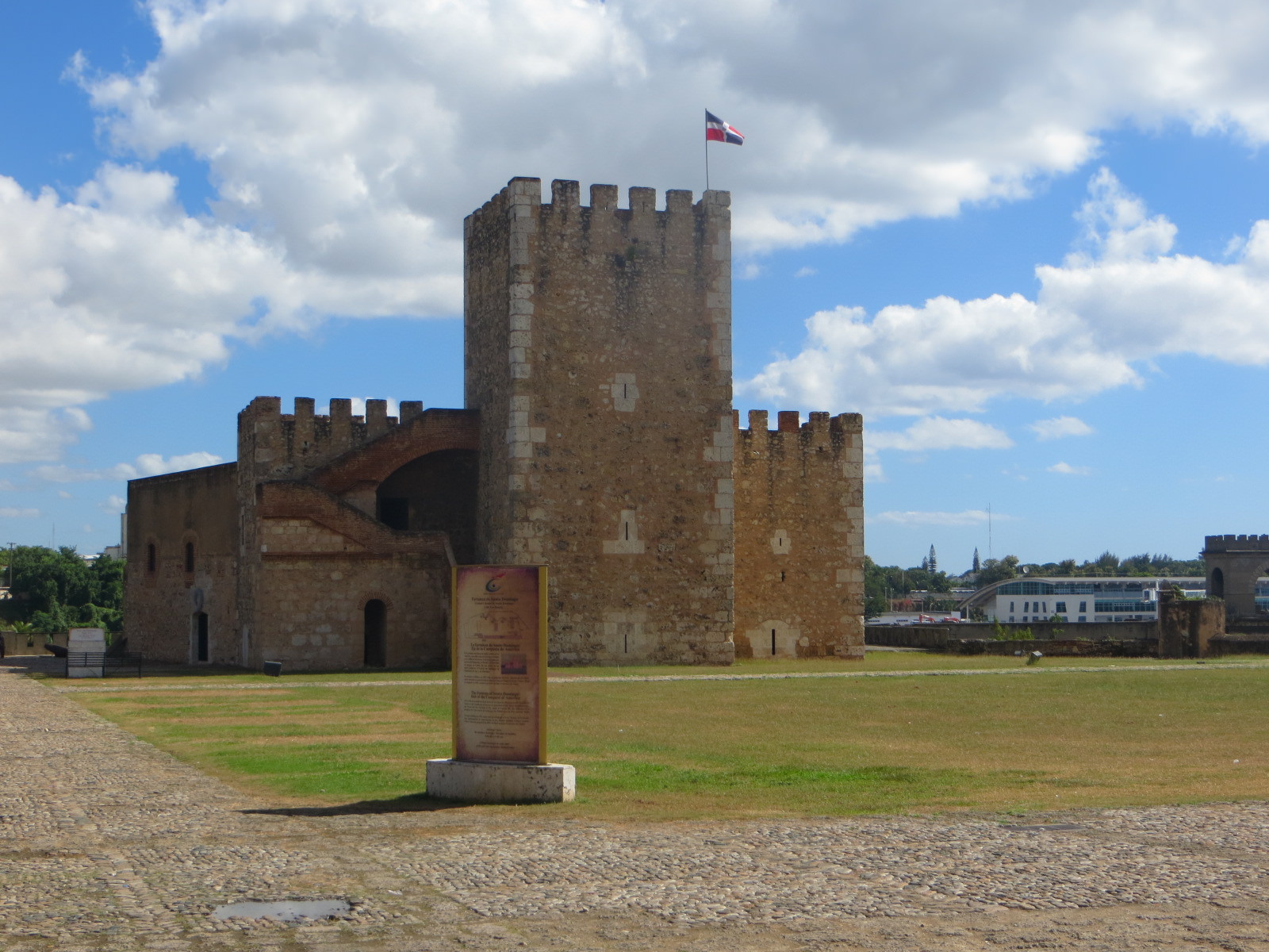 Santo Domingo (Rep. Dominicana) (137)